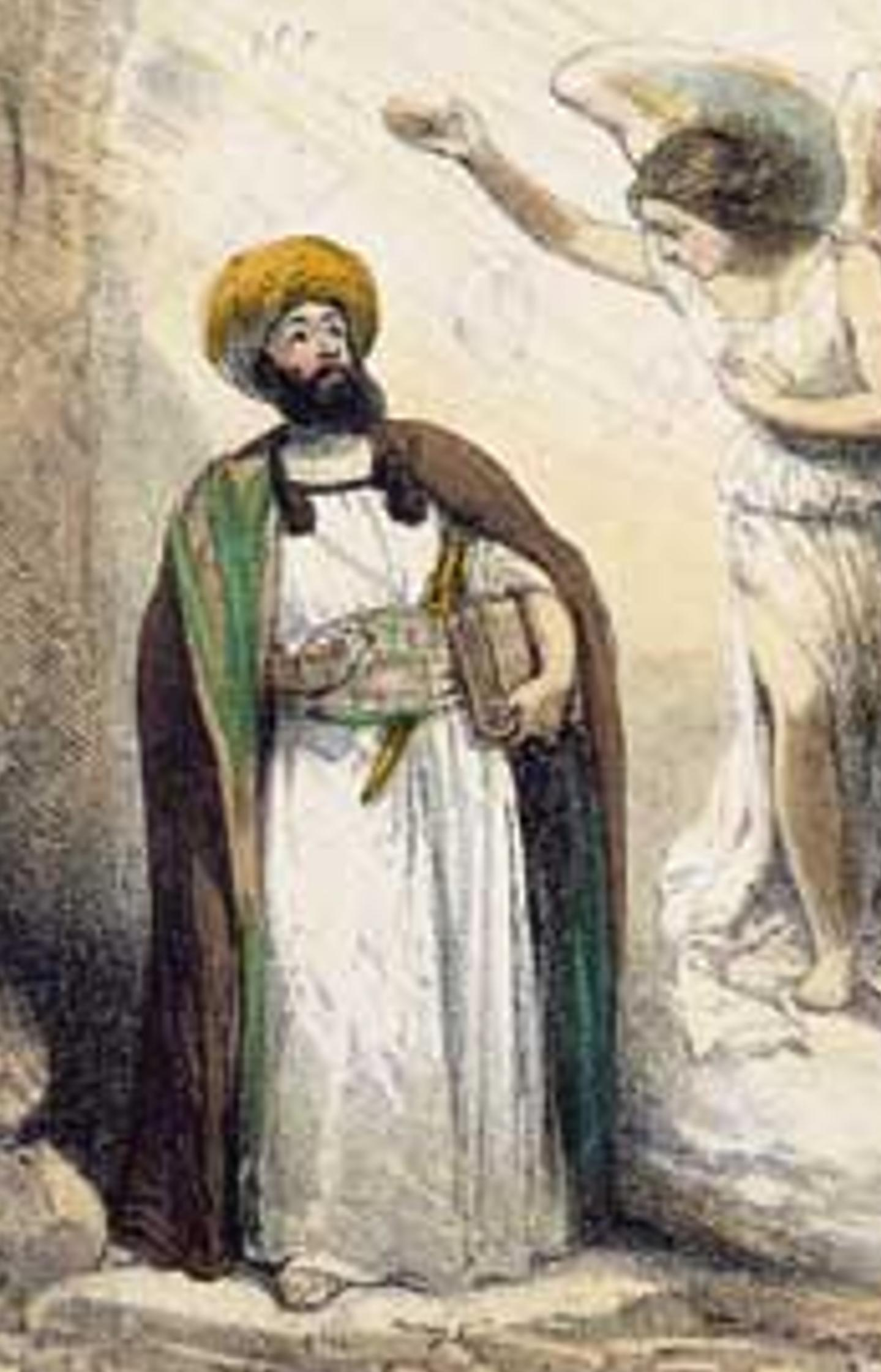 "Die Berufung Mohammeds durch den Engel Gabriel", According